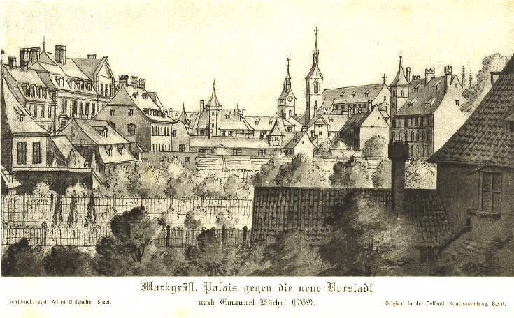 Markgräfliches Palais (Markgräflerhof) in Basel gegen die Vorstadt. Zeichnung von Emanuel Büchel